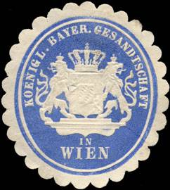 Sealing stamp Title: Koeniglich Bayerische Gesandtschaft in Wien Description: blau, weiß, geprägt Place: Wien size: 5x4 cm